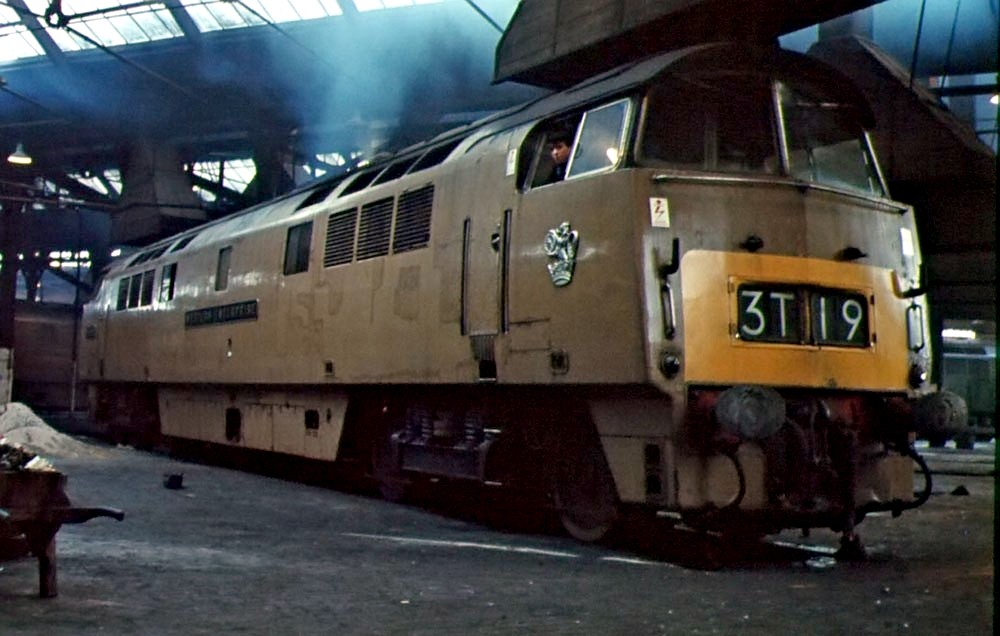 D1000 Western Enterprise in desert sand livery.